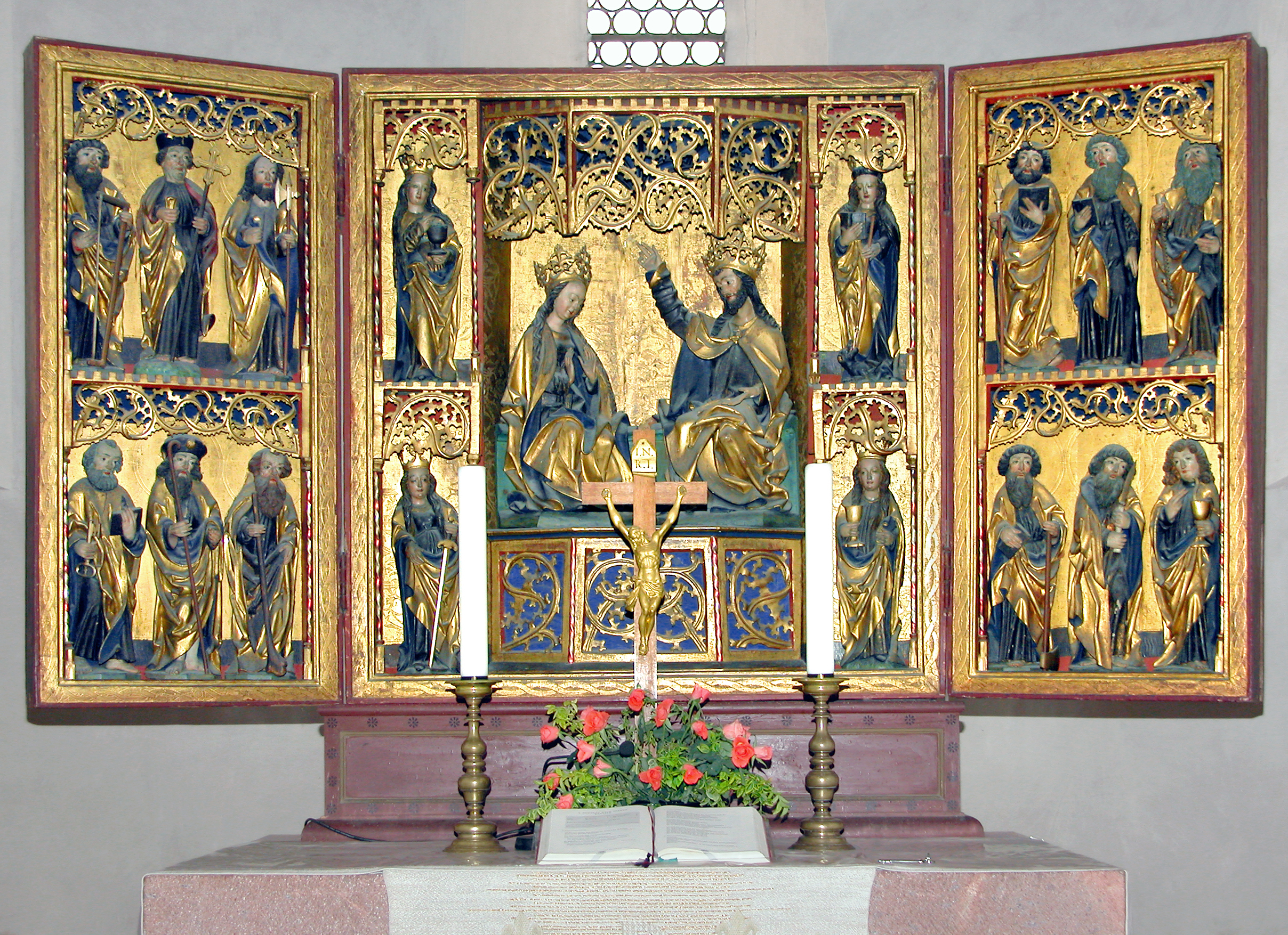 13.05.2009 04651 Bad Lausick, Kirchplatz: Stadtkirche St. Kilian. Dreischiffige romanische Pfeilerbasilika, 12. Jh. 1920 erhielt die Kirche aus Witznitz - einem Dorf, das dem Tagebau weichen musste - den jetzigen spätgotischen Flügelaltar, der um 1490 In einer Altenburger Schnitzerschule entstanden ist. [DSCN37397.TIF]20090513355DR.JPG(c)Blobelt